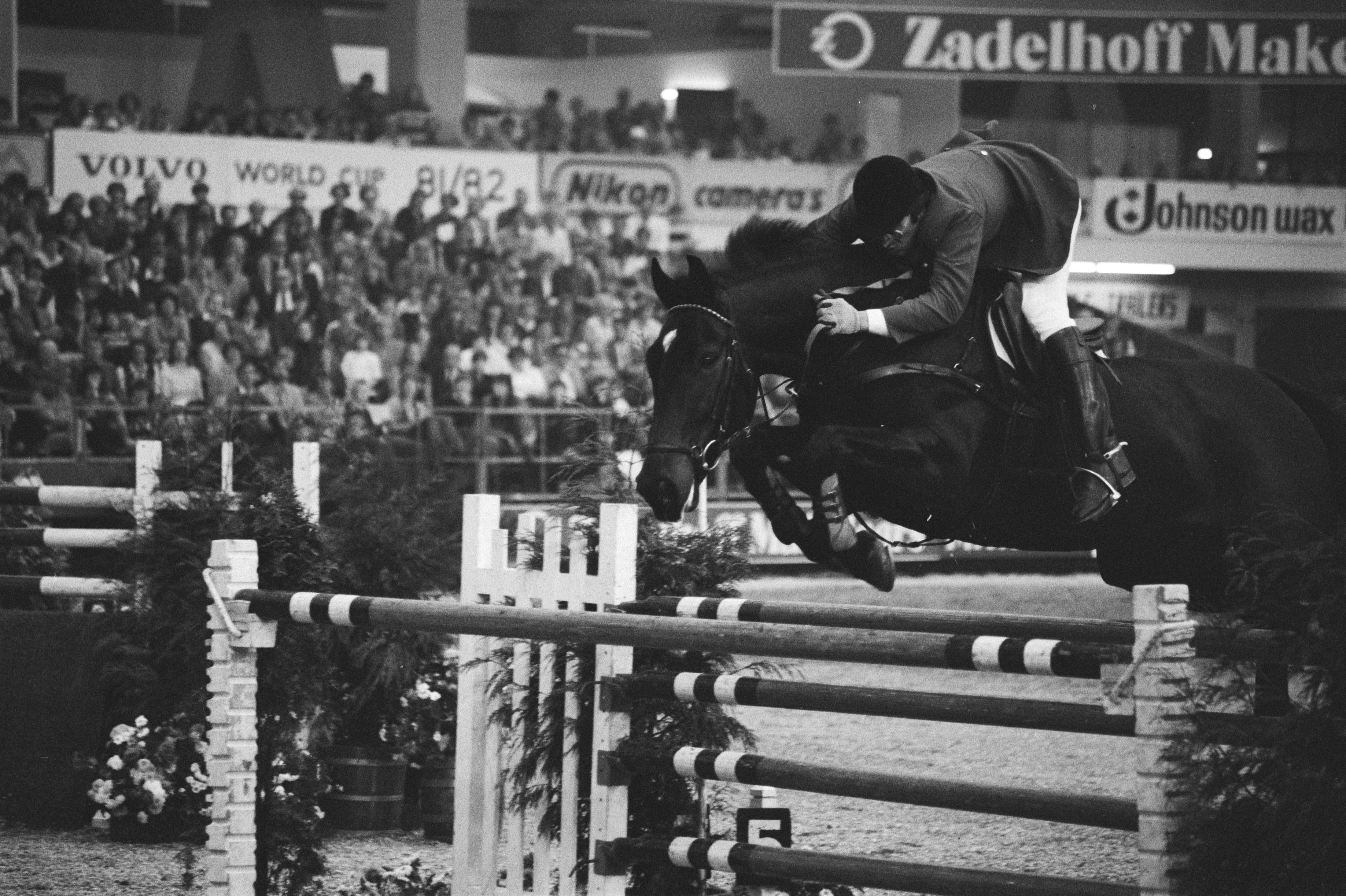 Collectie / Archief : Fotocollectie Anefo Reportage / Serie : Jumping Amsterdam in de RAI; Grote Prijs van Amsterdam Beschrijving : Winnaar Edgar Cuepper met het paard Cyrano (België) Datum : 1 november 1981 Locatie : Amsterdam, Noord-Holland Trefwoorden : Cyrano (paard), concours hippique Persoonsnaam : Cuepper, Edgar Instellingsnaam : Jumping Amsterdam Fotograaf : Antonisse, Marcel / Anefo Auteursrechthebbende : Nationaal Archief Materiaalsoort : Negatief (zwart/wit) Nummer archiefinventaris : bekijk toegang 2.24.01.05 Bestanddeelnummer : 931-7779